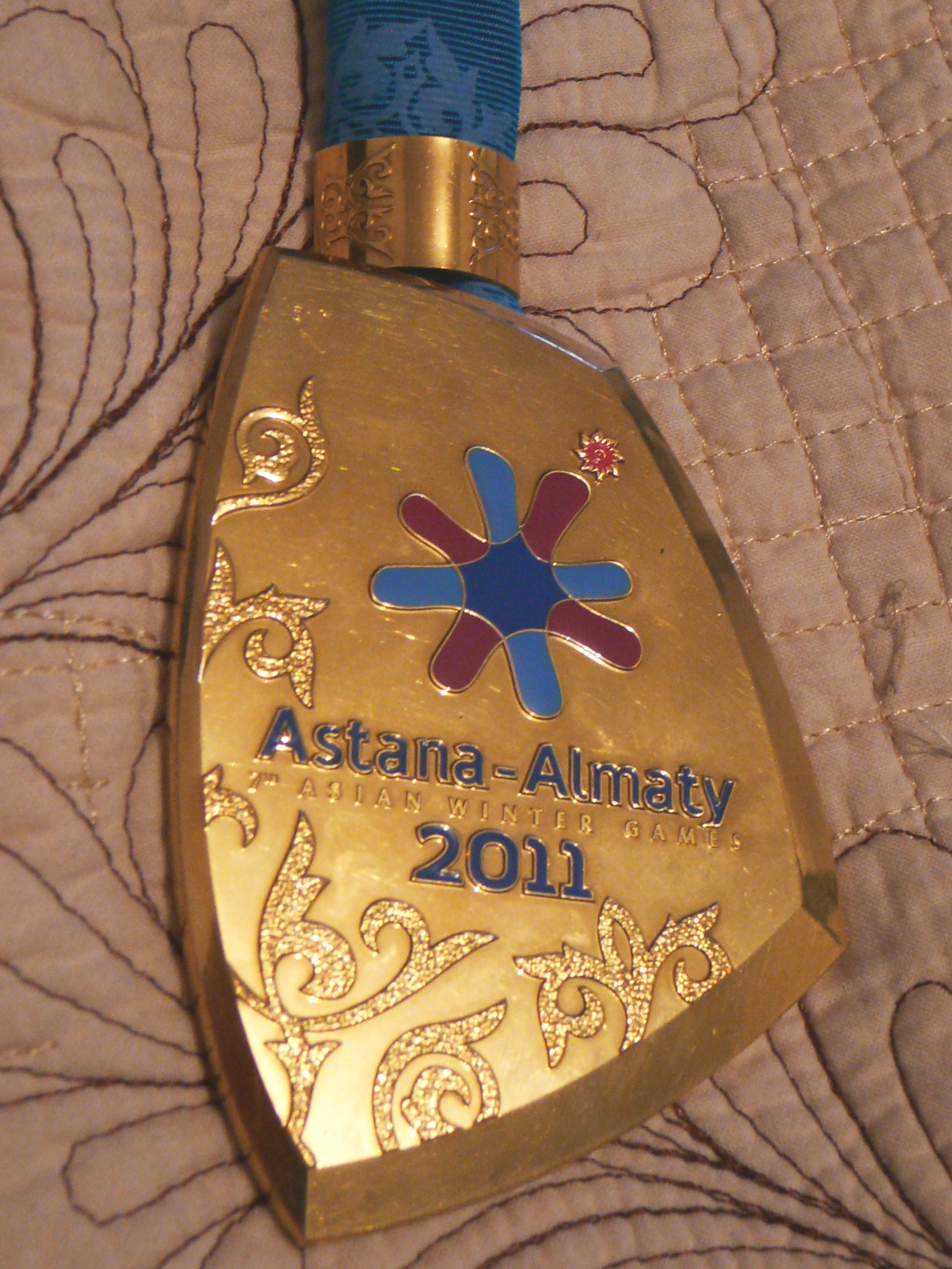 Золотая медаль Азиады-2011. Медаль принадлежит игроку женской сборной Казахстана по хоккею с шайбой - Нургалиевой Галие.